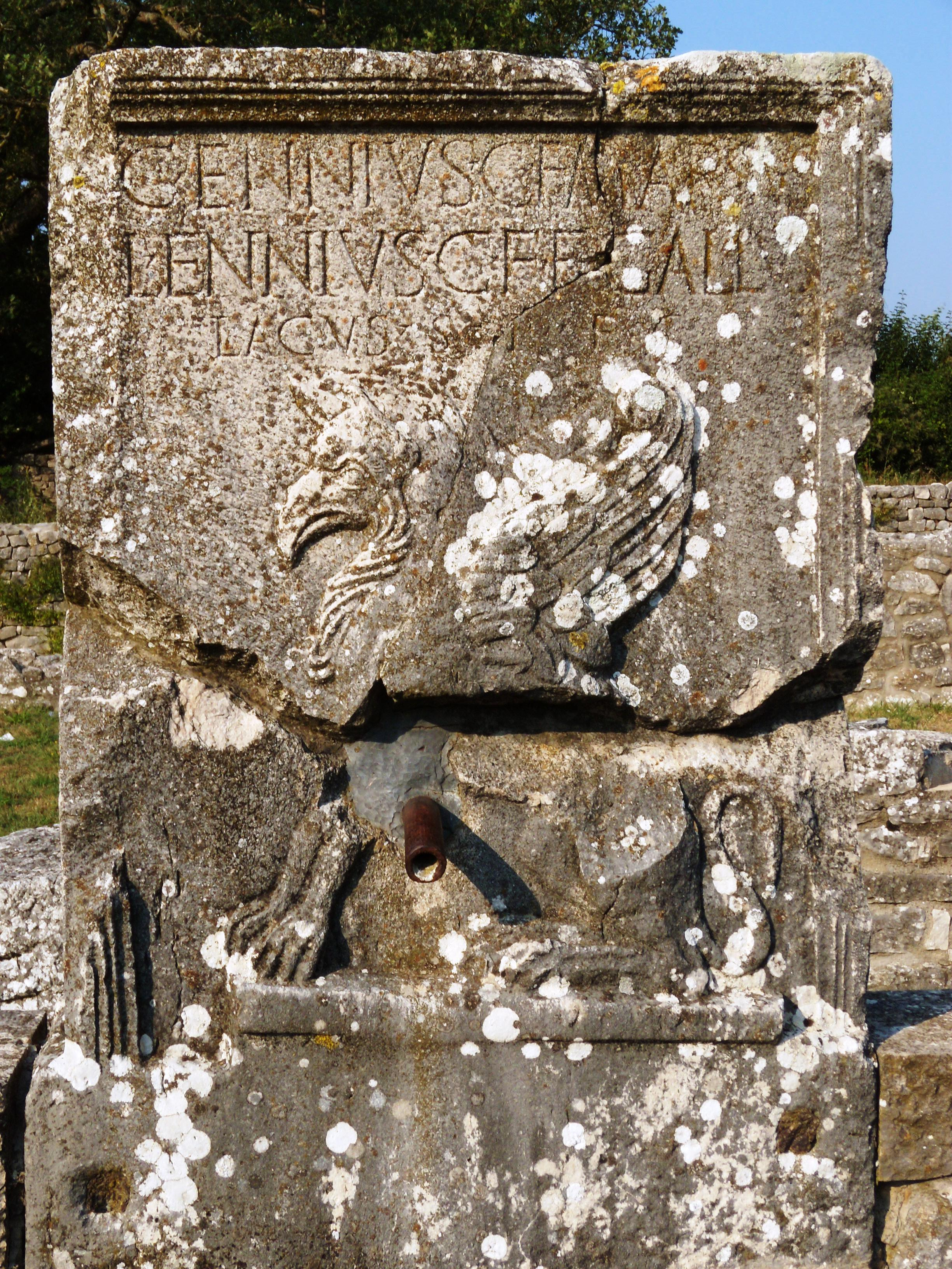 Scavi archeologici di Saepinum (Italy): fontana del Grifo (epoca romana).